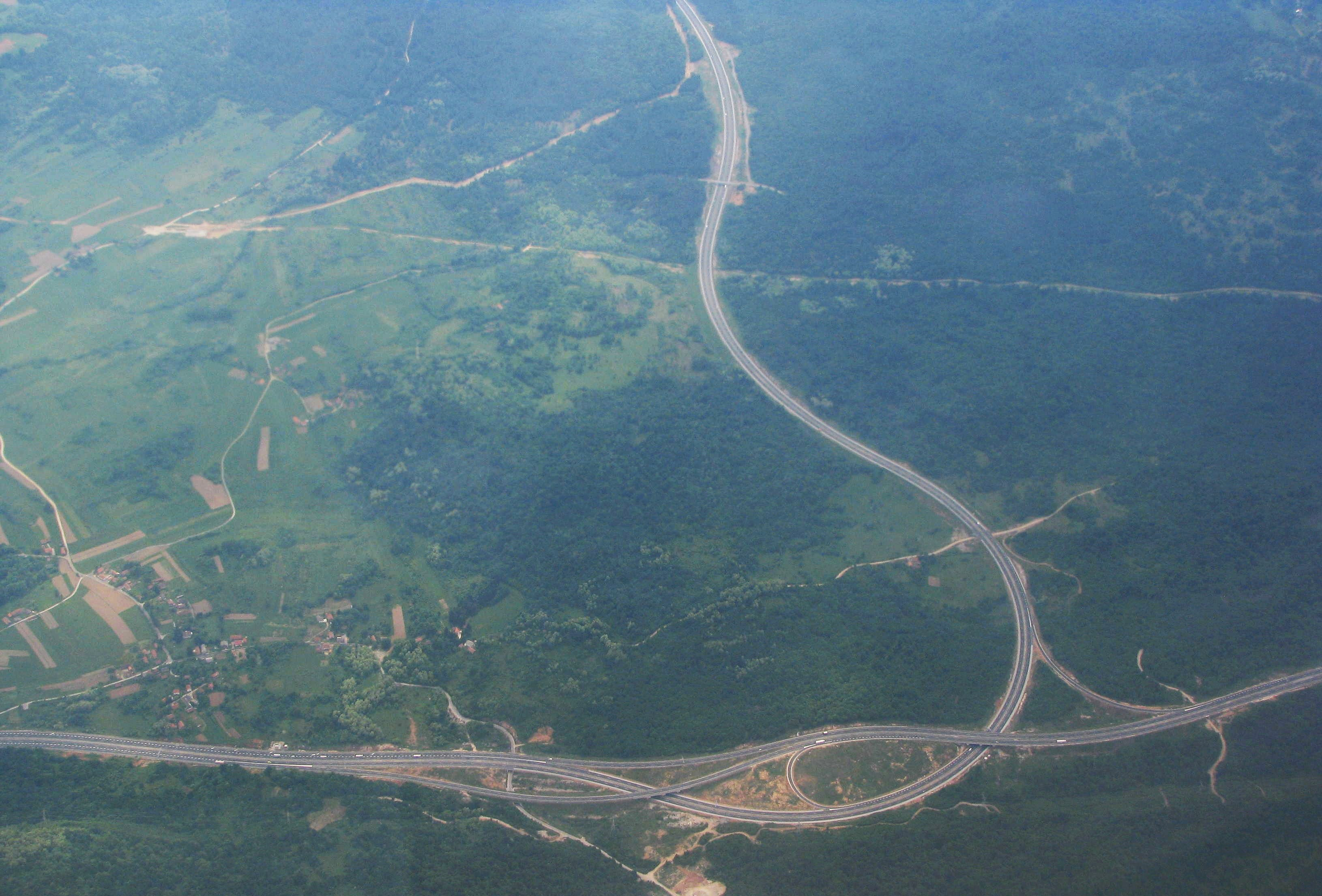 Čvorište Bosiljevo na Autocesti A1 i A6